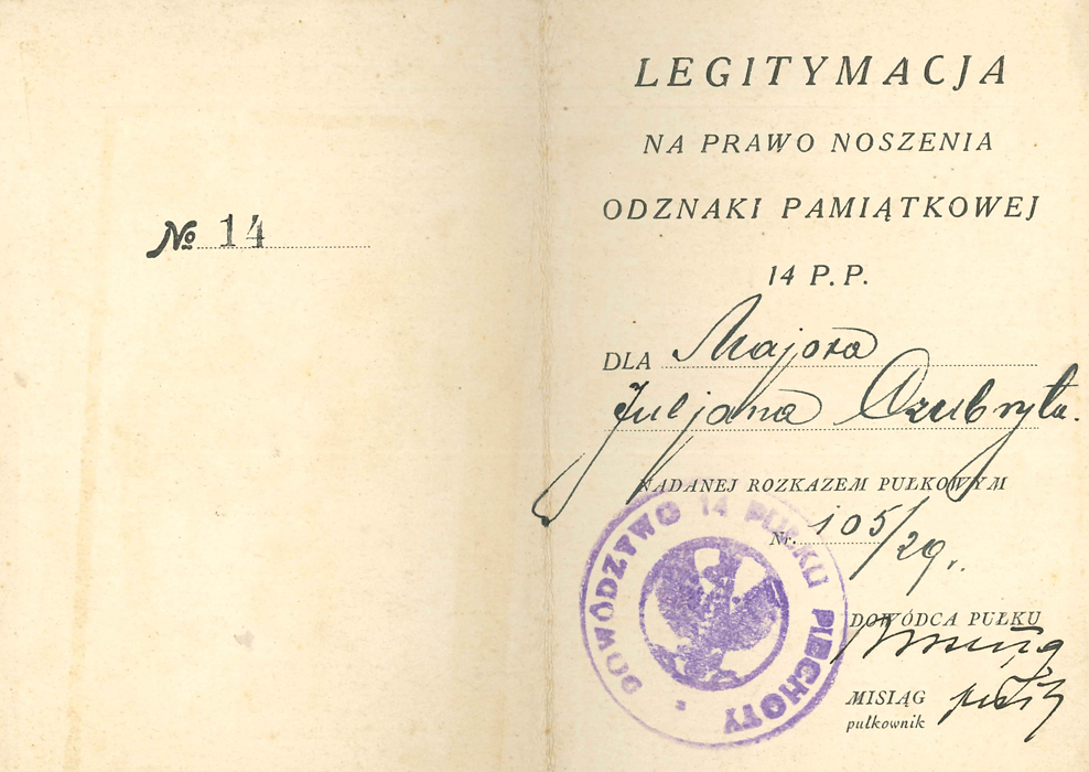 Legitymacja odznaki 14 pp